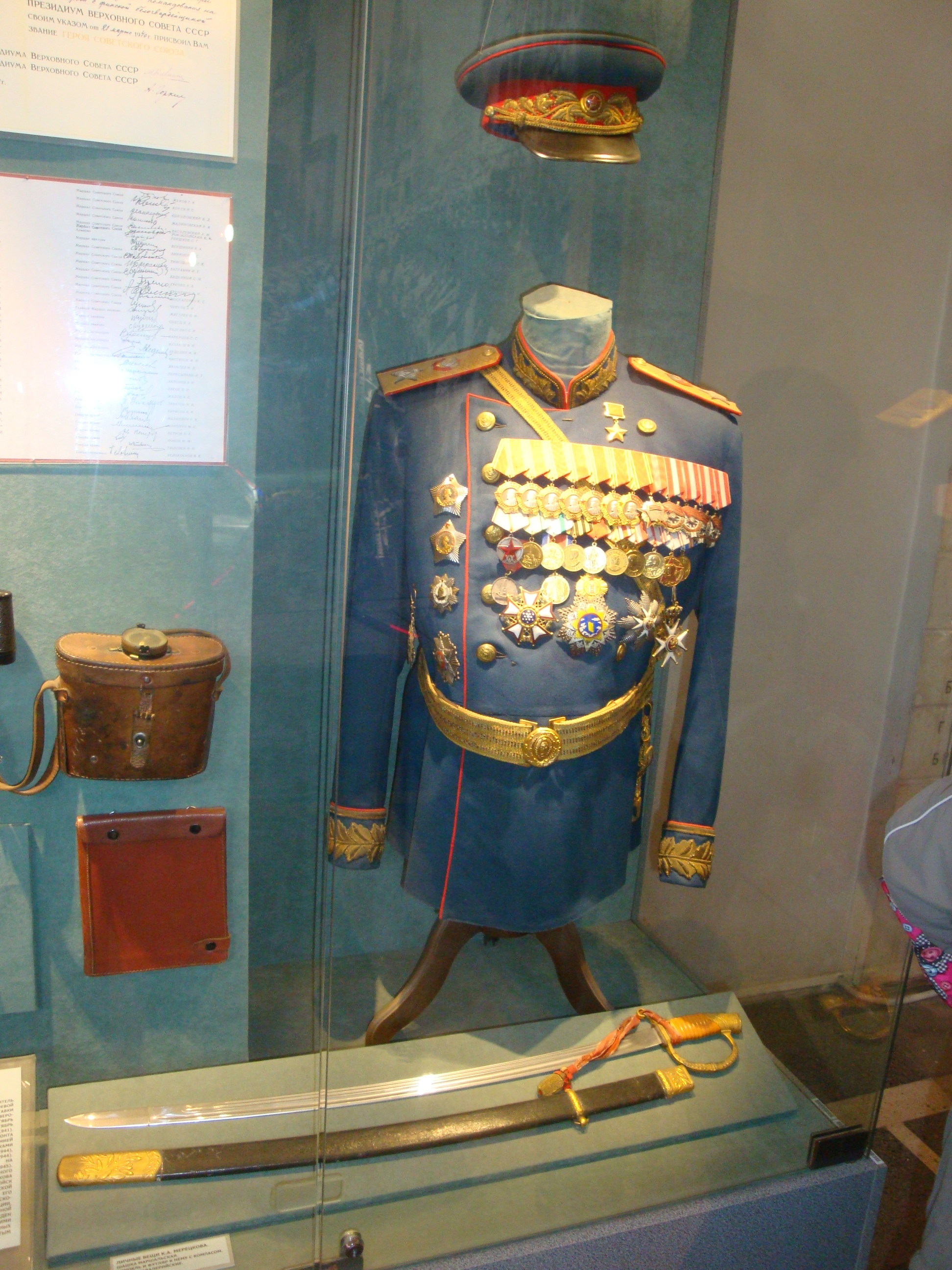 Китель Мерецкова с наградами